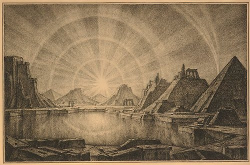 Костянтин Богаєвський. «Фантазійний пейзаж з пірамідами» (1922)